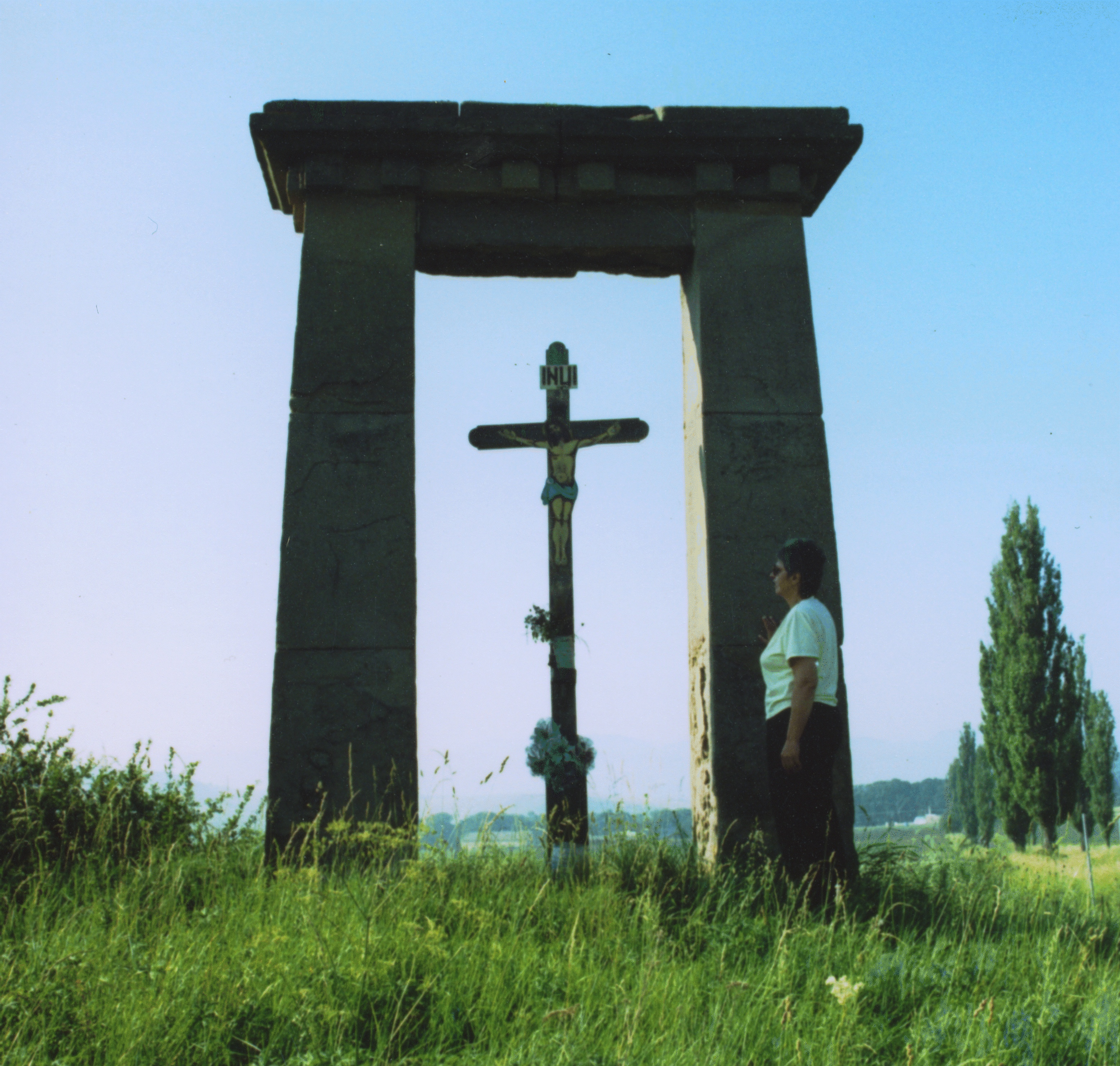 Starodávne popravisko - šibenica pod Spišským hradom, fotografia z r. 2002. Photo taken by Jozafát Vladimír Timkovič, OSBM